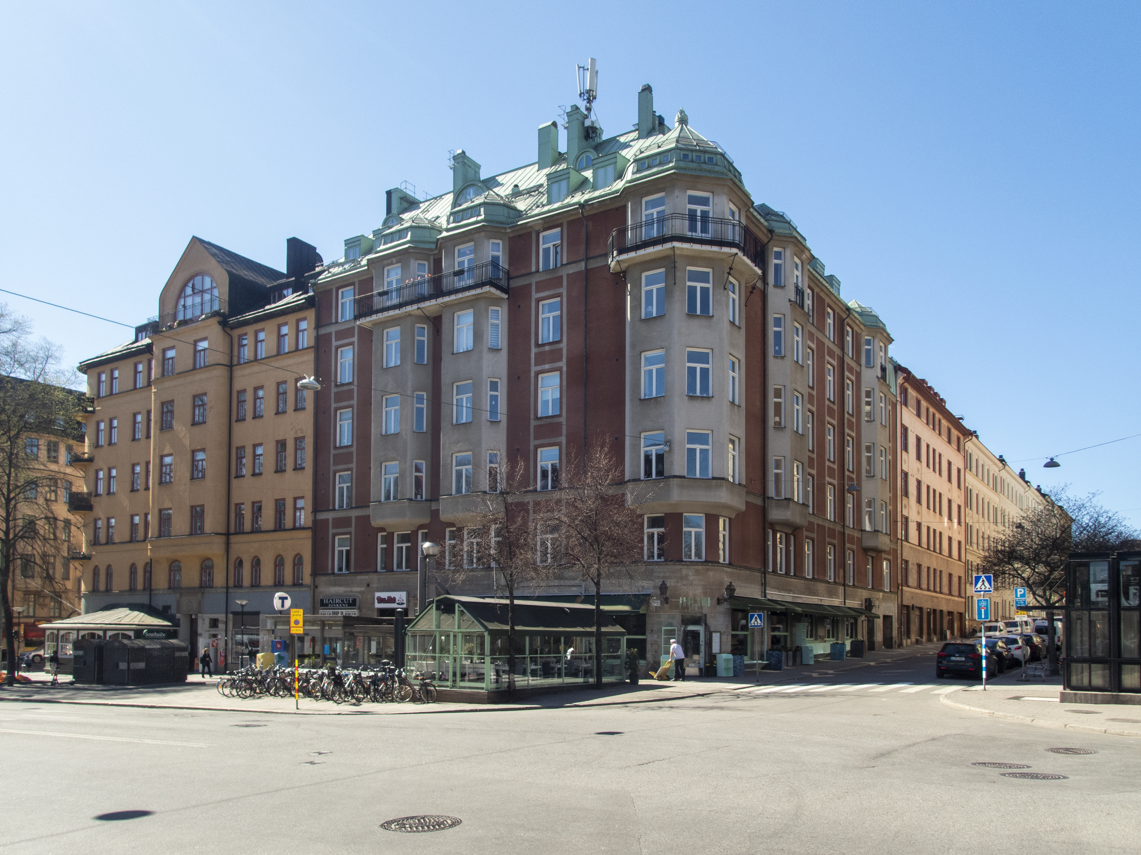 Tapeten 1, Brännkyrkagatan 93, Ringvägen 8 Stockholm Nybyggnadsår 1907 - 1910 C. B. Ödberg (Byggmästare) Dorph & Höög (Arkitekt) Wiktor Hagberg (Byggherre)